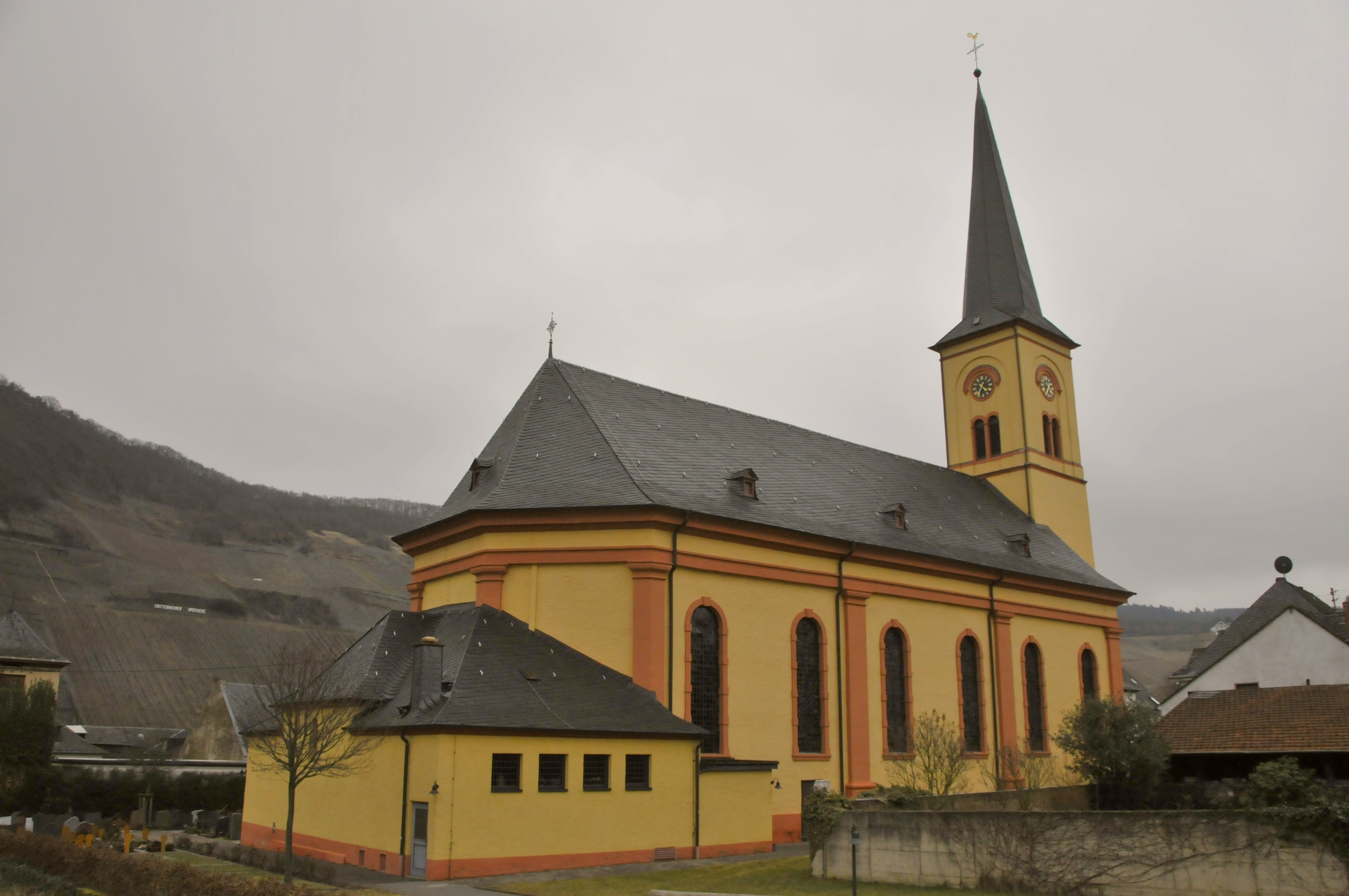 Trittenheim, Michaeliskirche